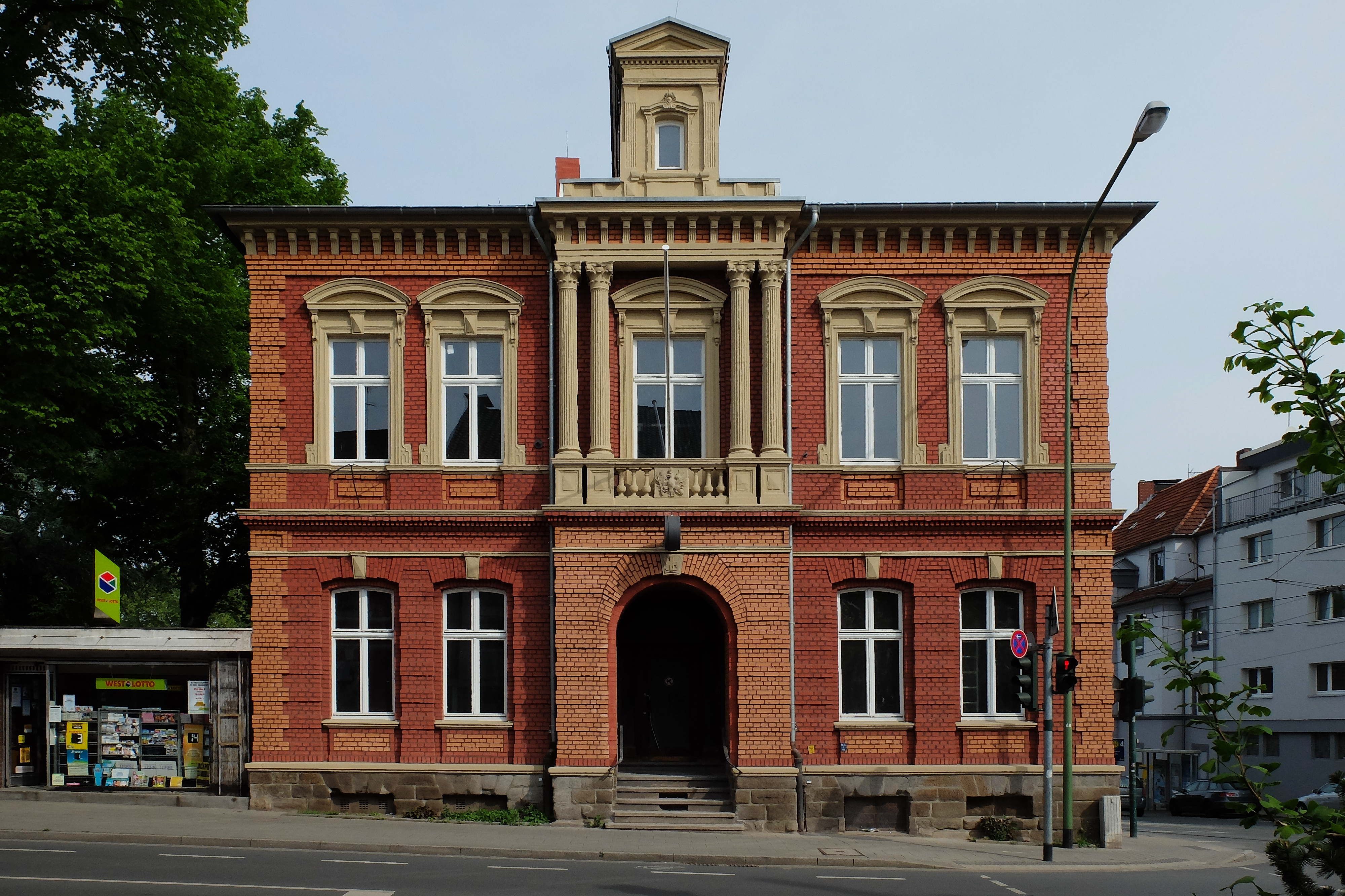 Frankenstraße 102 Essen-Rellinghausen ehemaliges Rathaus Denkmal-Nr. 611